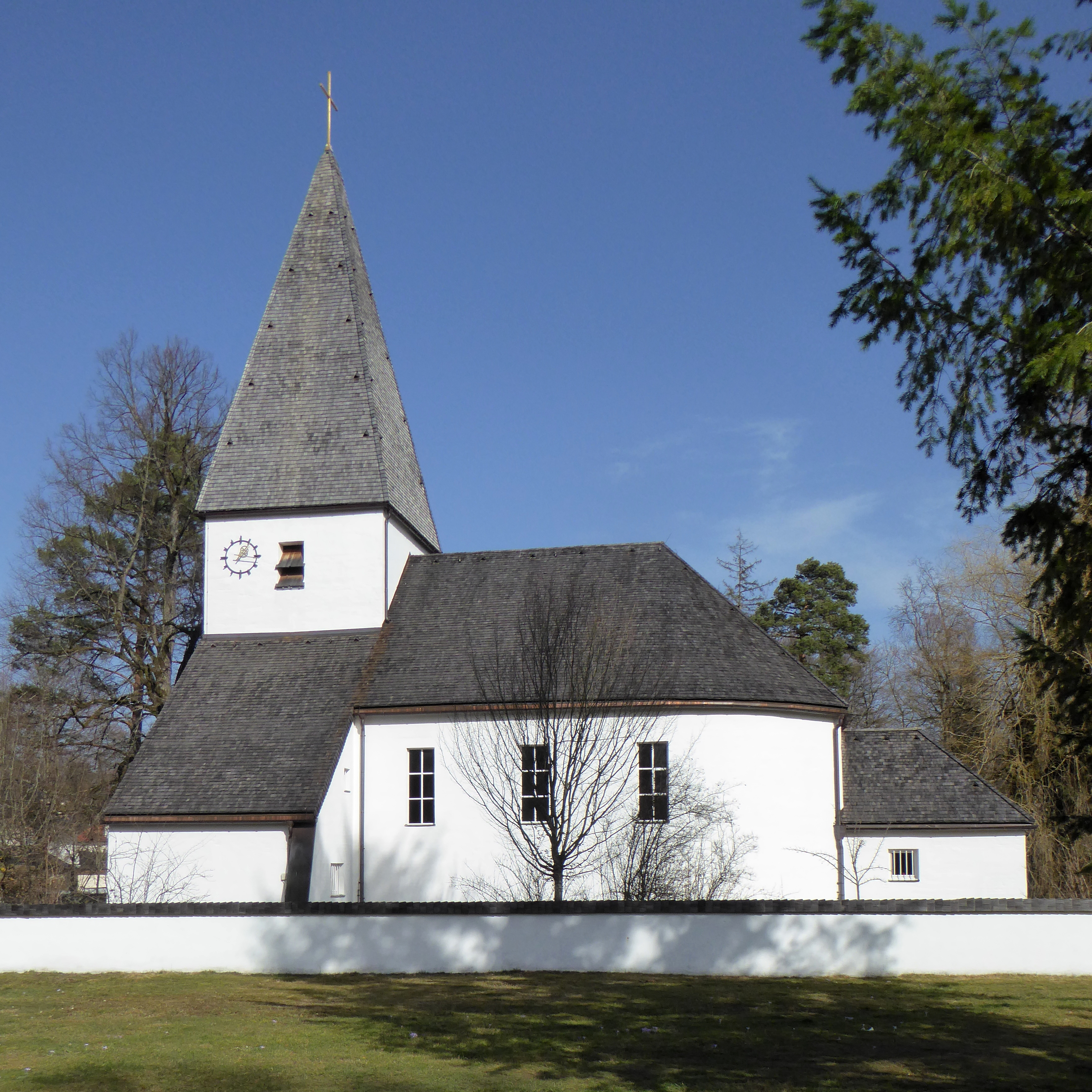 Grünwald, Thomaskirche (von Südwesten; Beschreibung siehe hier).